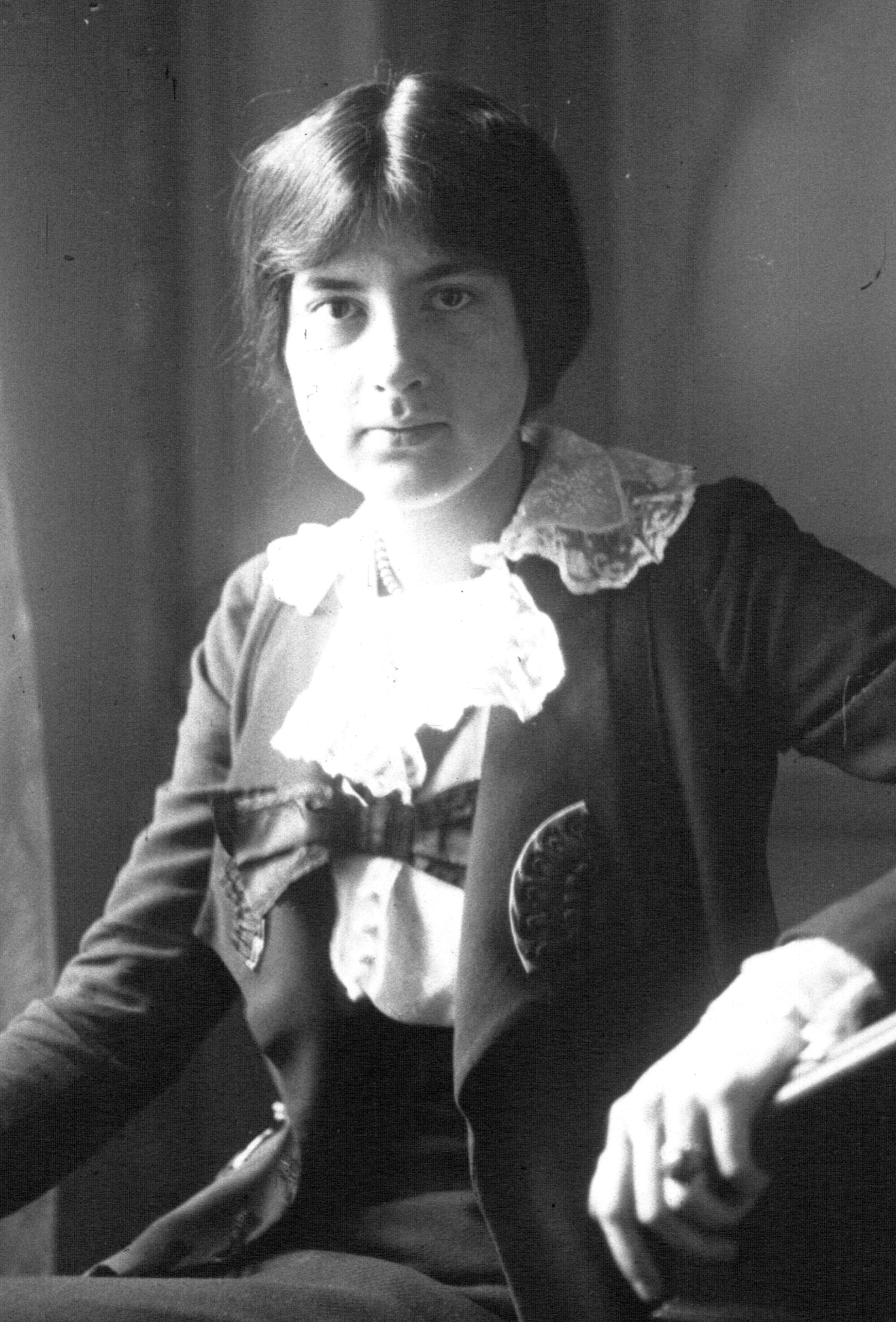 Lili Boulanger, 1er Grand Prix de Rome de musique 1913 : [photographie de presse] / Agence Meurisse